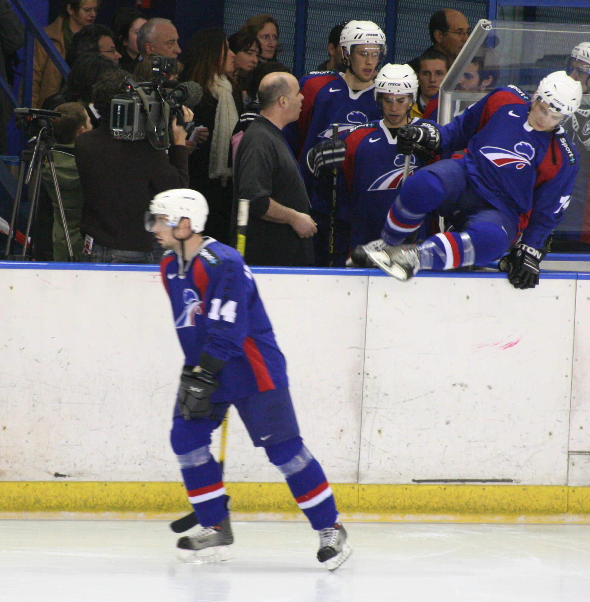 match de hockey sur glace, France - Pologne, Julien Desrosiers